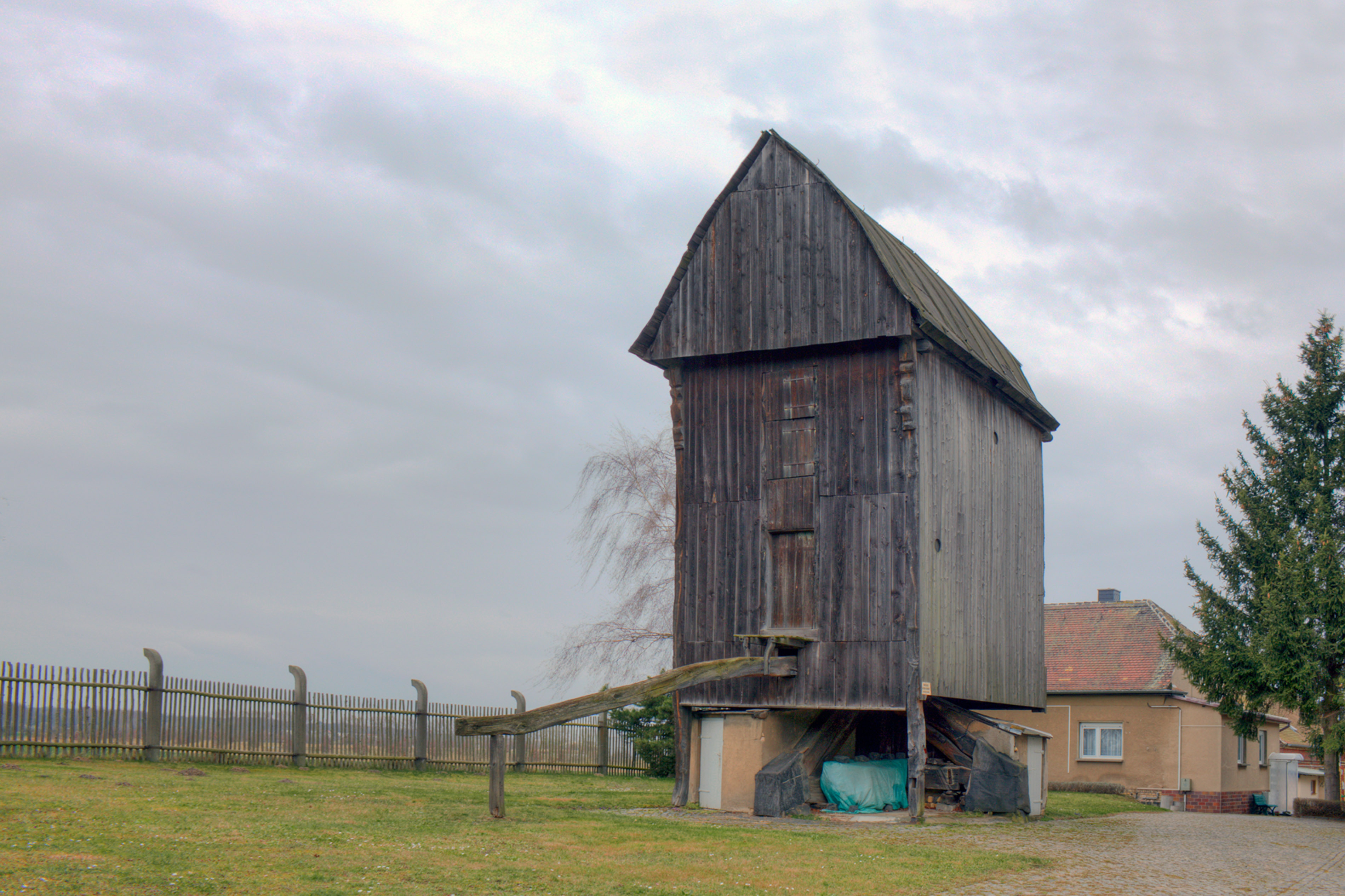 Windmühle, Alte Salzstraße 1a in Taucha OT Merkwitz